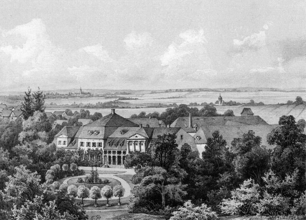 Ehemaliges Herrenhaus des Rittergutes zu Wachau bei Leipzig